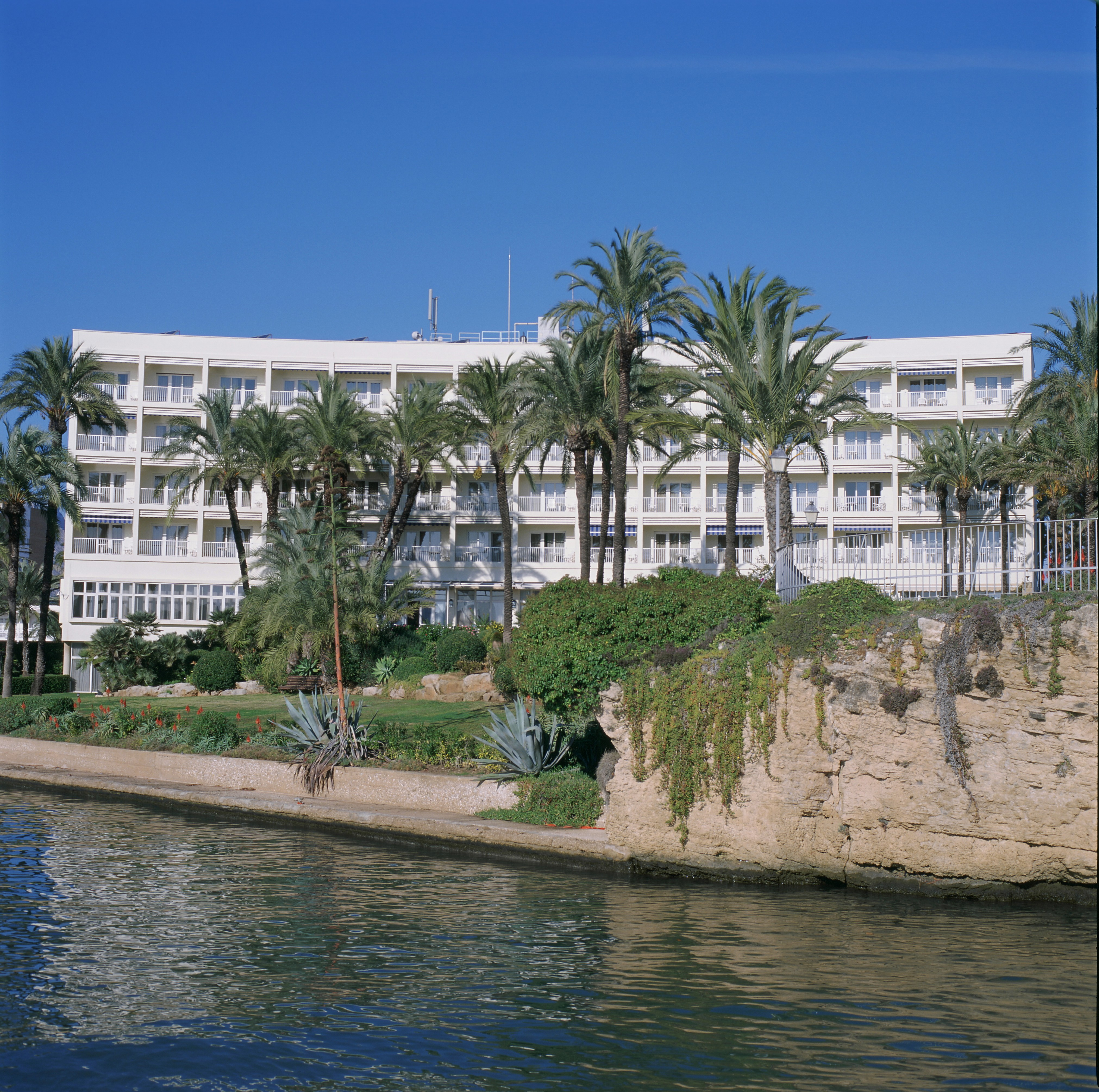 Parador de Jávea